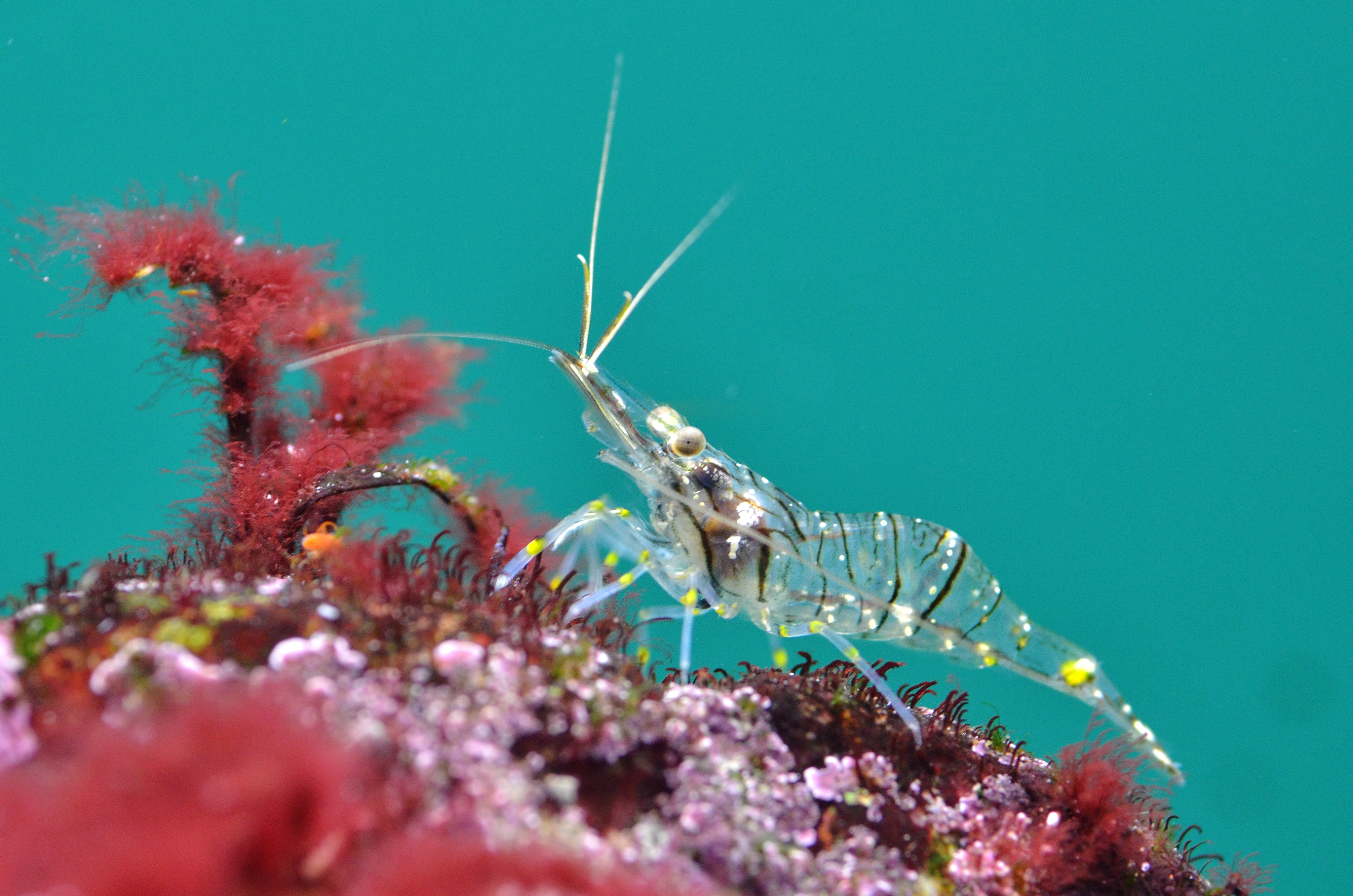 Palaemon serratus (Crustacea , Decapoda) in captivity. Aquarium de la maison de la Baie de Saint-Brieuc, Bretagne, France Nom français : le bouquet